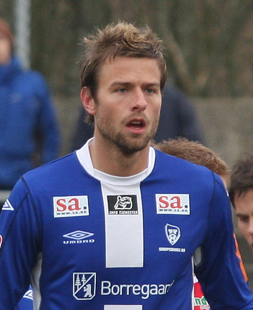 Øyvind Hoås, Sarpsborg 08